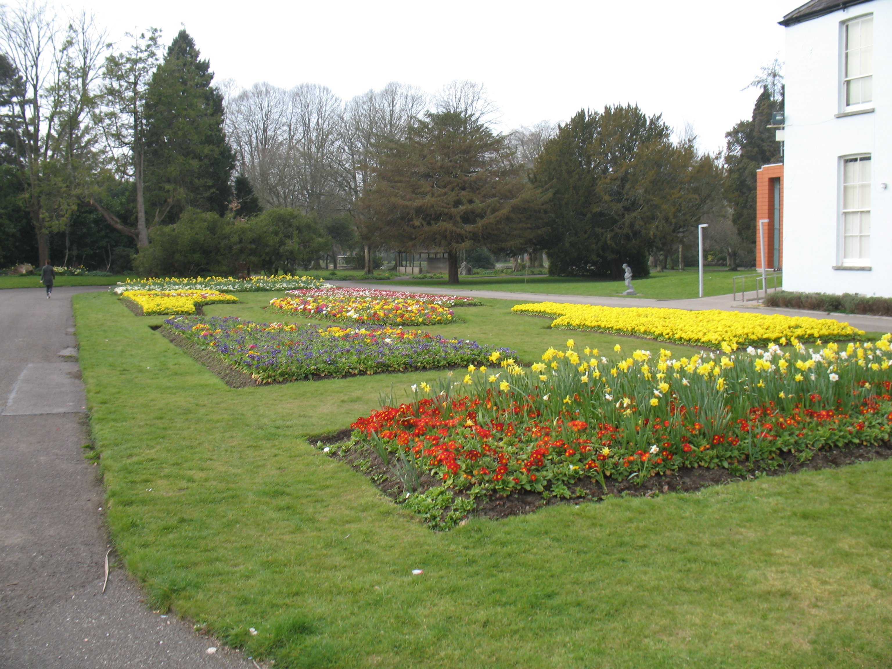 Fitzgerald Park and Cork Public Museum, Cork